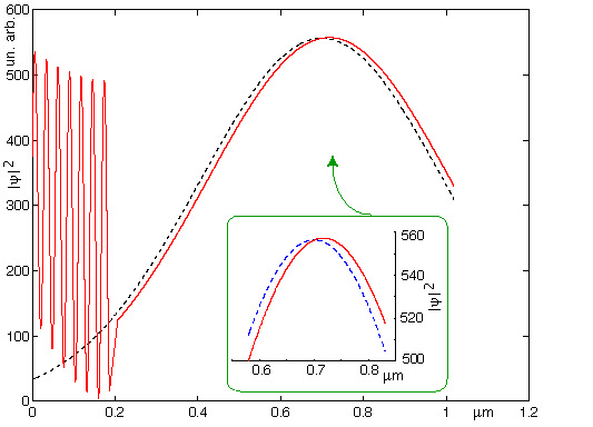 figure créée par Pickwick pour illustrer l'effet Hartman. un paquet d'onde, gaussien, traverse une barrière tunnel rectangulaire. Sont visibles le phénomène d'interférences (partie incidente et partie réfléchie) et l'avance du sommet de la partie transmise par rapport au paquet qui n'aurait pas subi la barrière de potentiel.